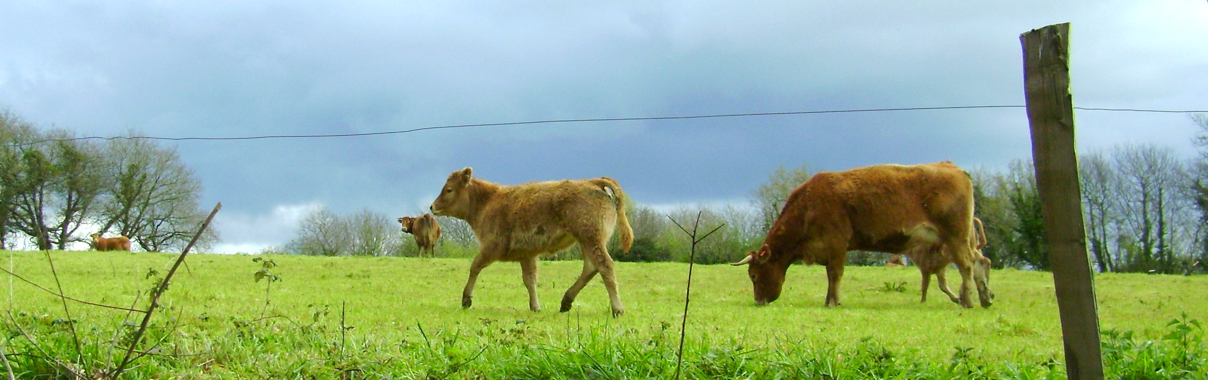 Logonna-Daoulas, Vaches Limousine.JPG